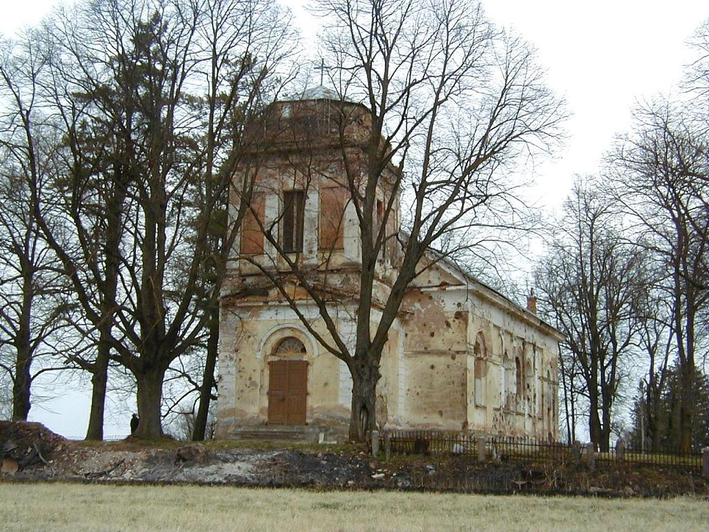 Vecsaules luterāņu baznīca 2002-04-13